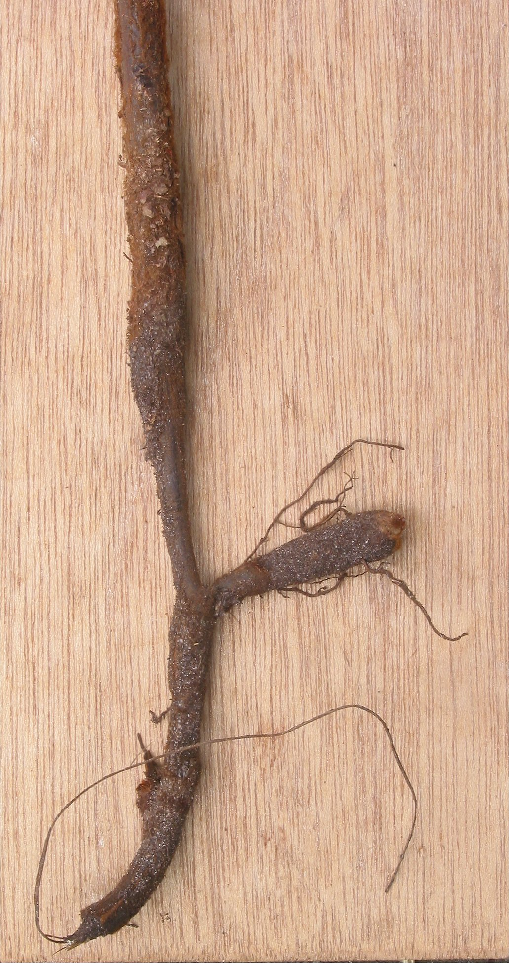 (nl: Adelaarsvaren wortelstok) Pteridium aquilinum rhizome